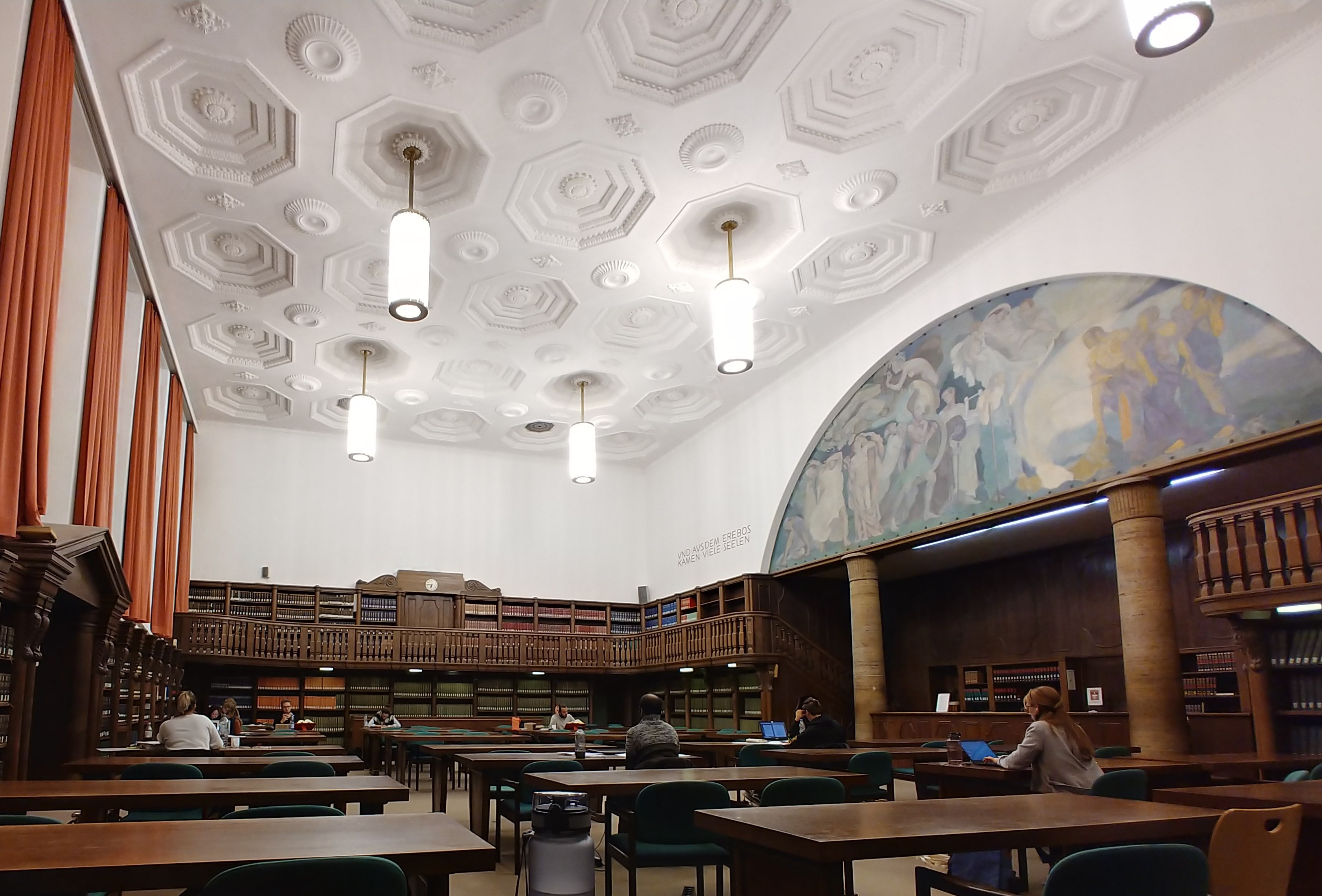 Interior of University of Tübingen's Bonatzbau